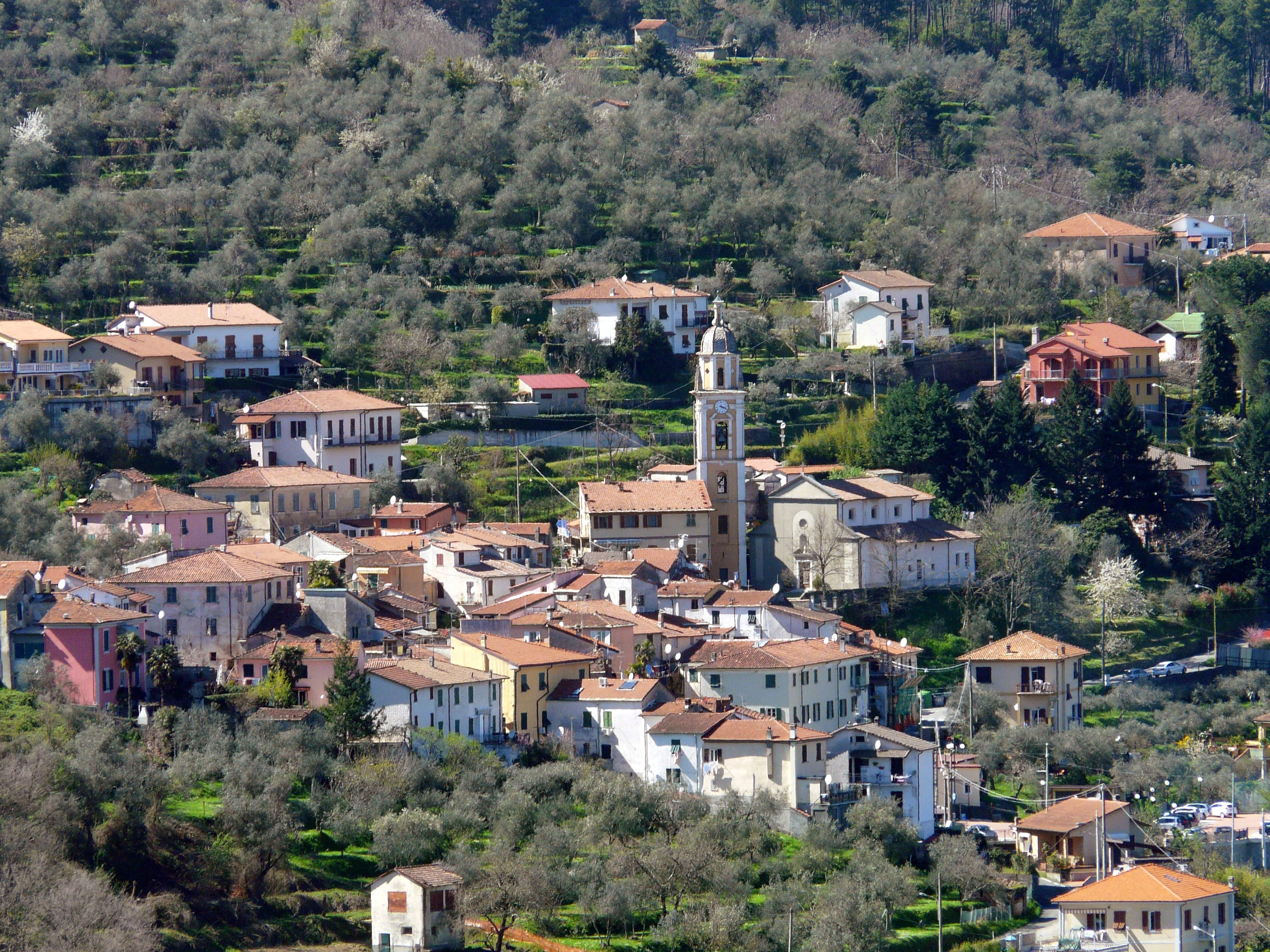 Panorama di Bastremoli (Follo) da Valeriano, Vezzano Ligure, Liguria, Italia